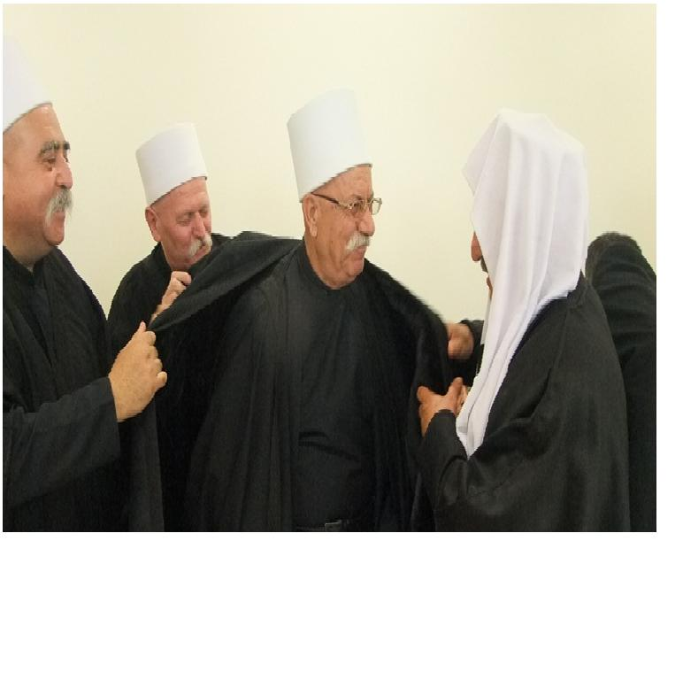 השיך נעים הנו מקבל אות הערכה ממנהיגי העדה הדרוזית